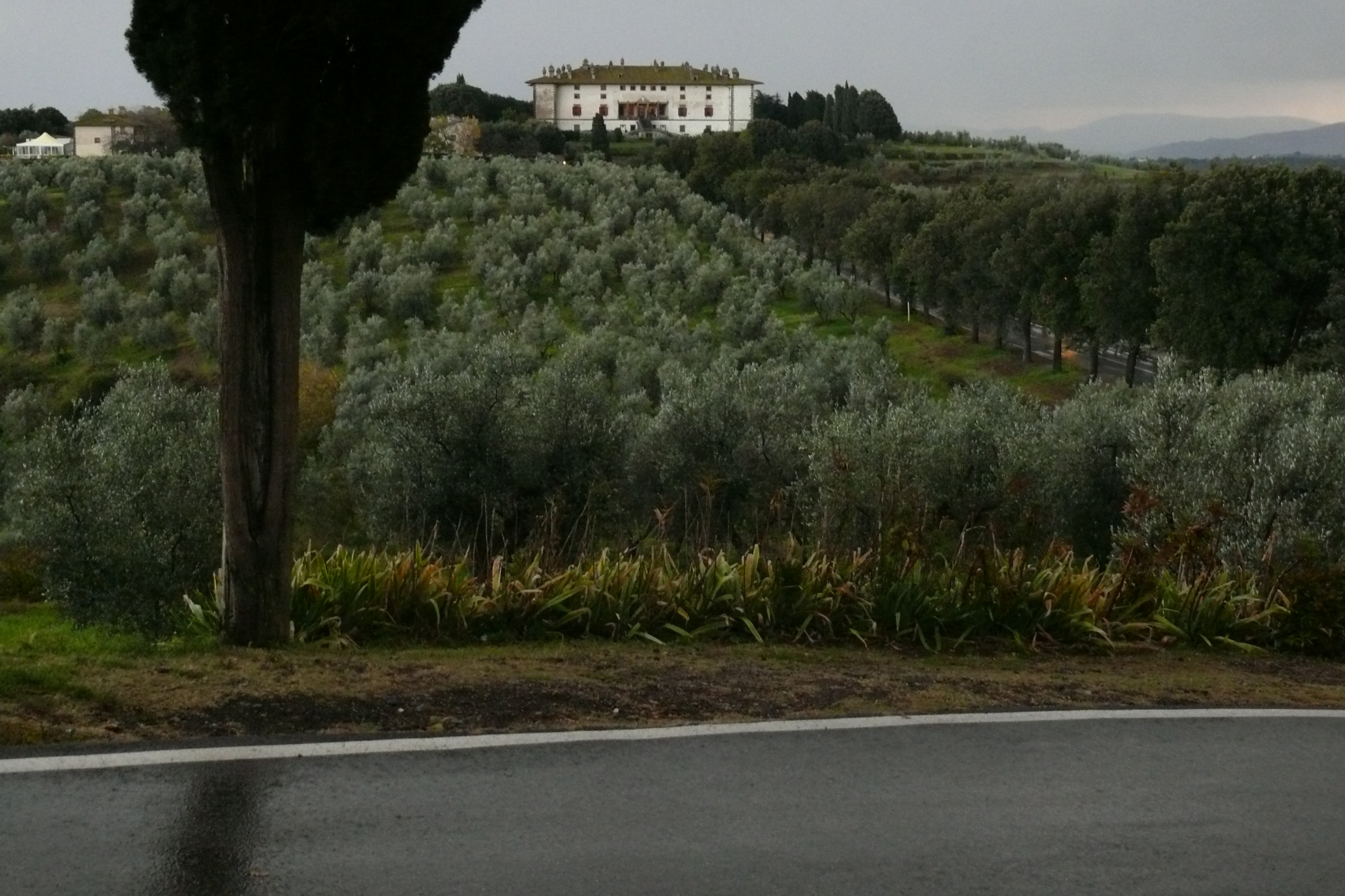 La villa medicea vista dall'abitato di Artimino